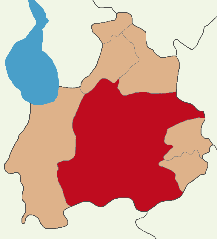 Aksaray Merkez ilçesinin konumu